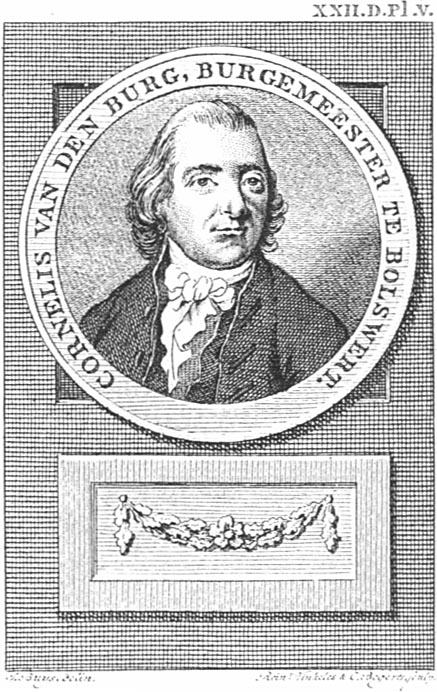 Portrait of Cornelis van den Burg (1752-1813)